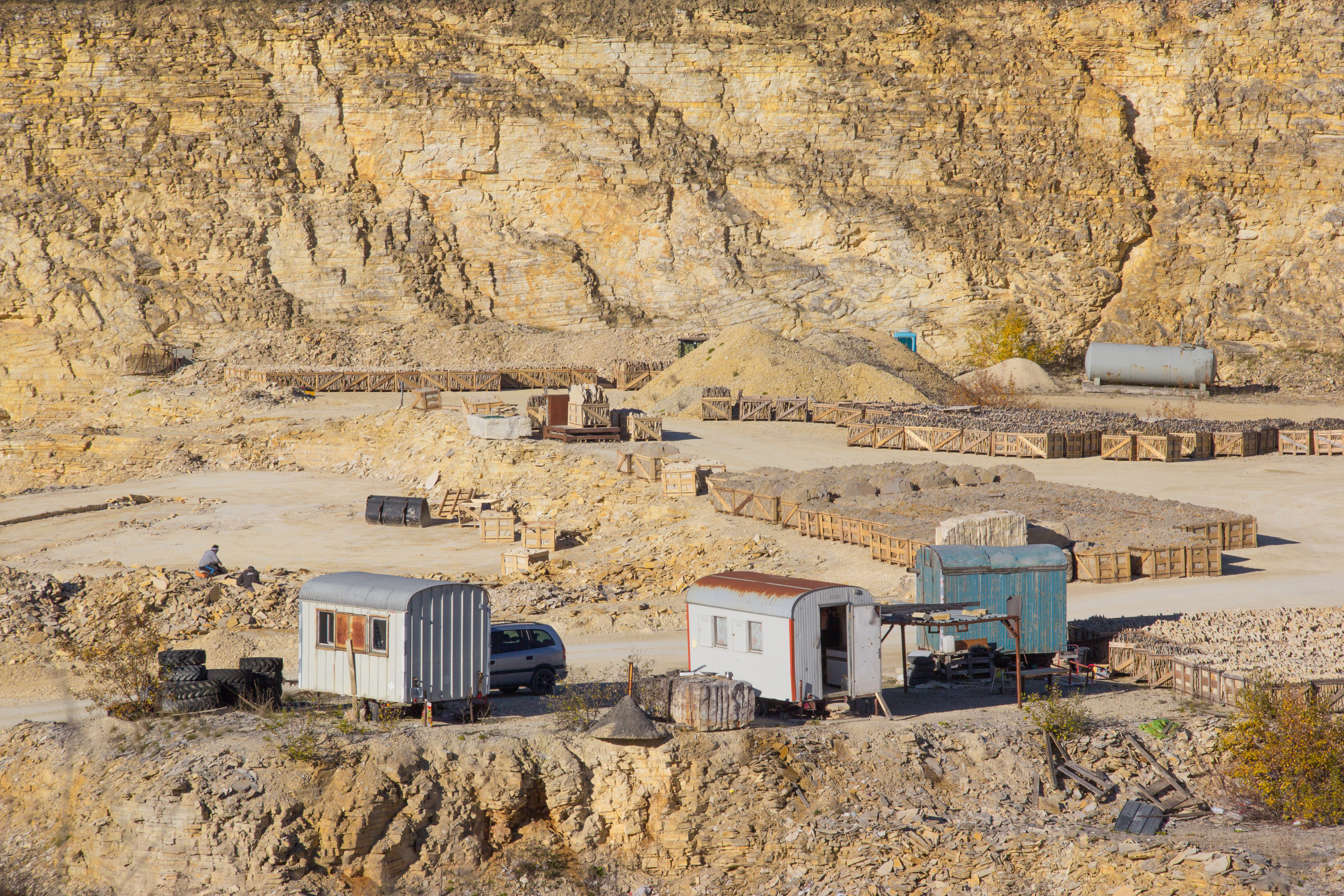 Steinbruch, Blumenberg bei Eichstätt, Naturpark Altmühltal